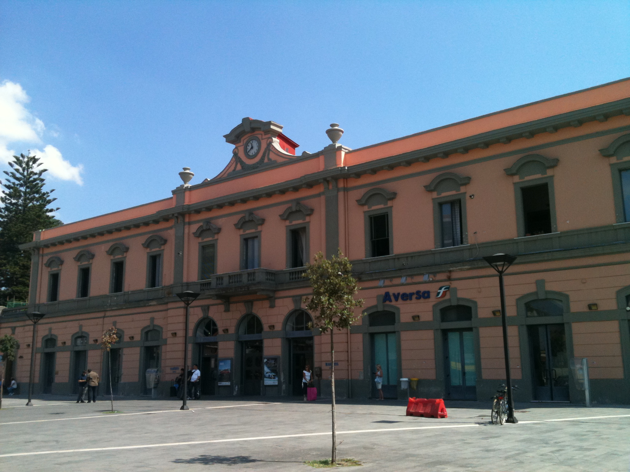 Opera propria